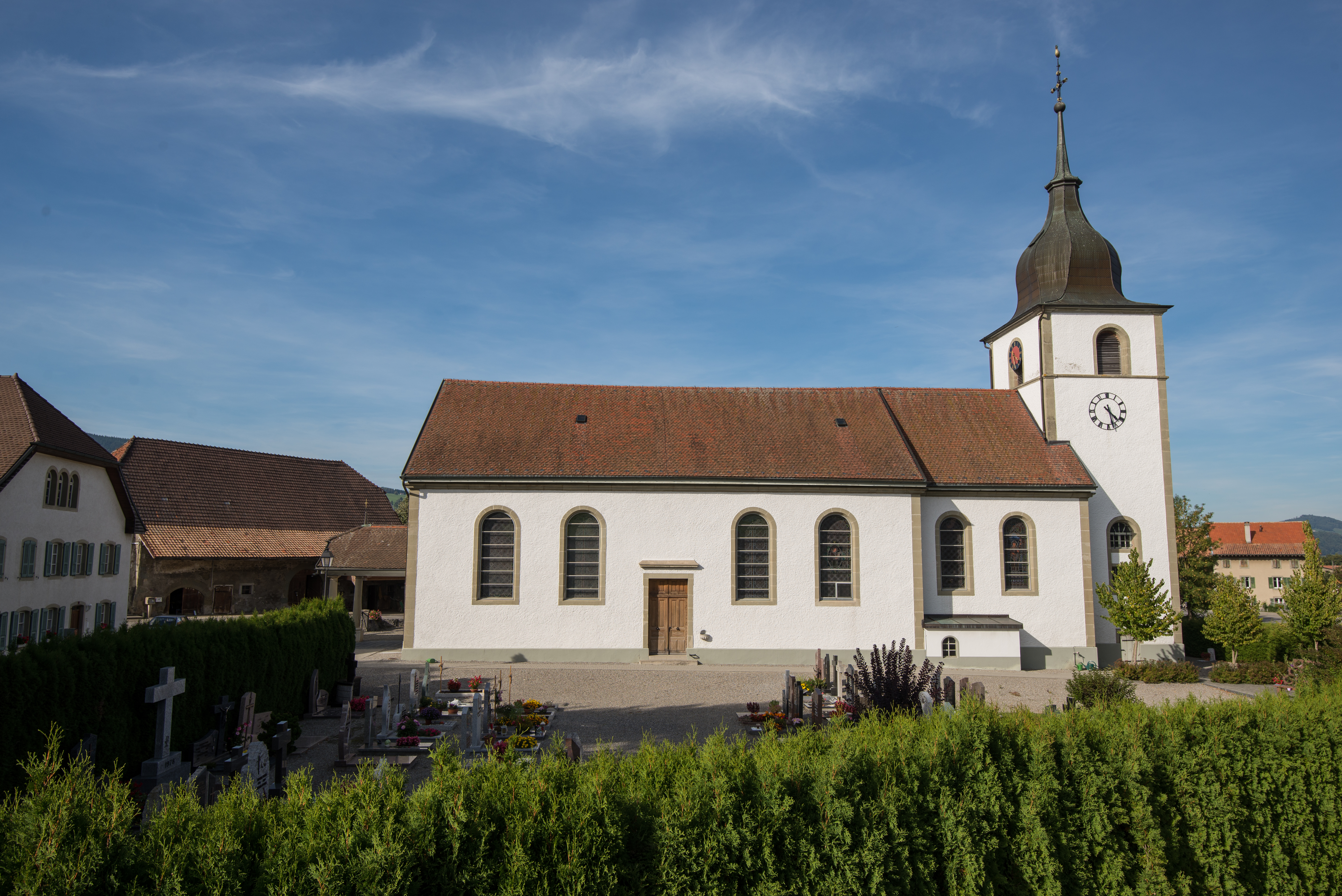 Eglise Saint-Sulpice